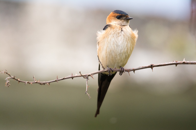 roodstuitzwaluw-3.jpg